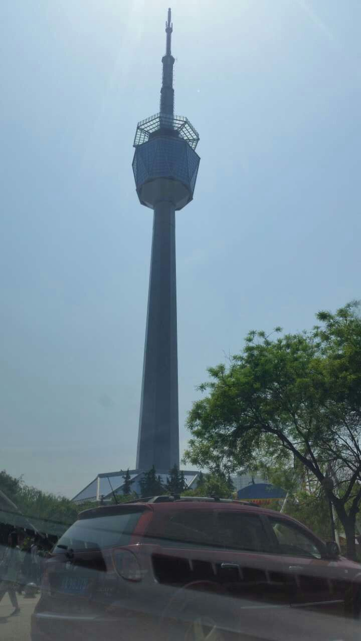 中文（中国大陆）: 陕西广播电视塔